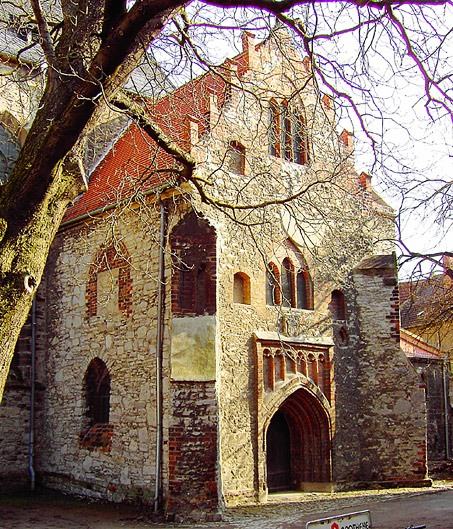 Südkapelle an der Stephanskirche Calbe